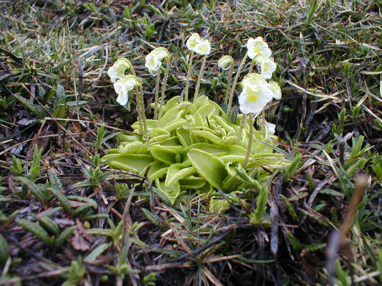 Pinguicula alpina Taken in natural habitat in Slovenia near Triglav